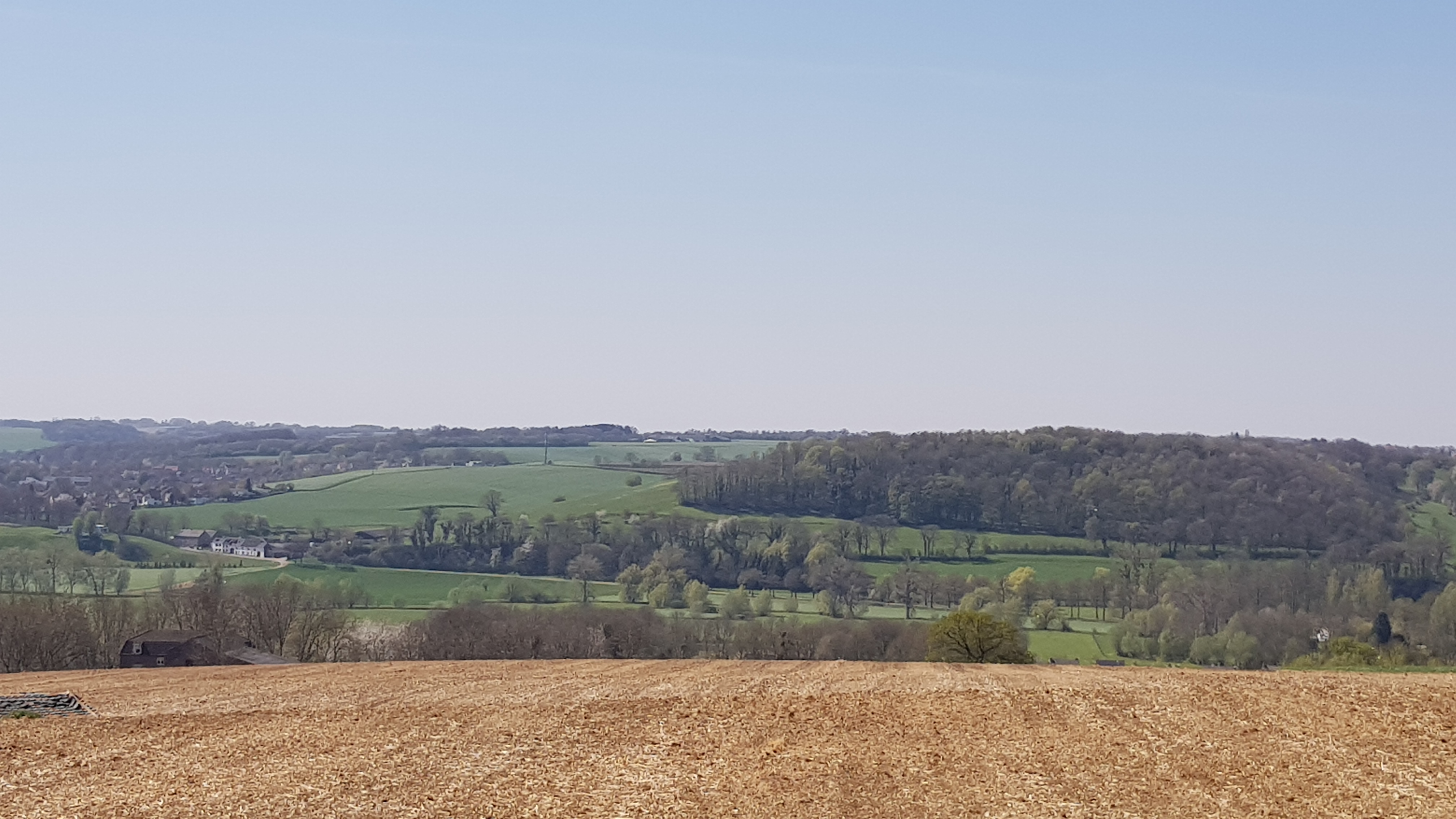 Dolsberg bij Gulpen, Nederland